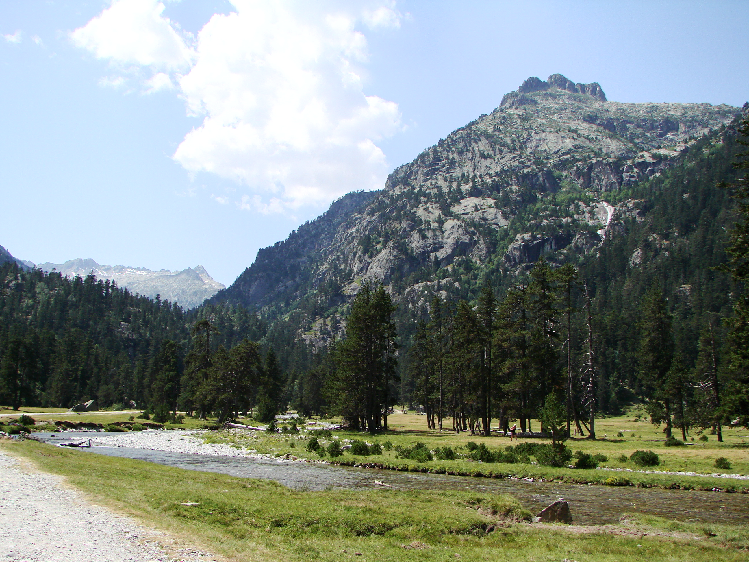 Vallée du Marcadau, Pyrénées françaises, commune de Cauterets, département des Hautes-Pyrénées (France)